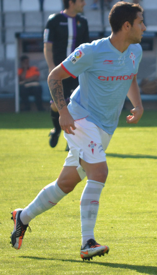 Hugo Mallo playing for Celta de Vigo